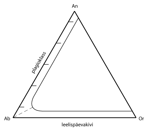 Päevakivide diagramm